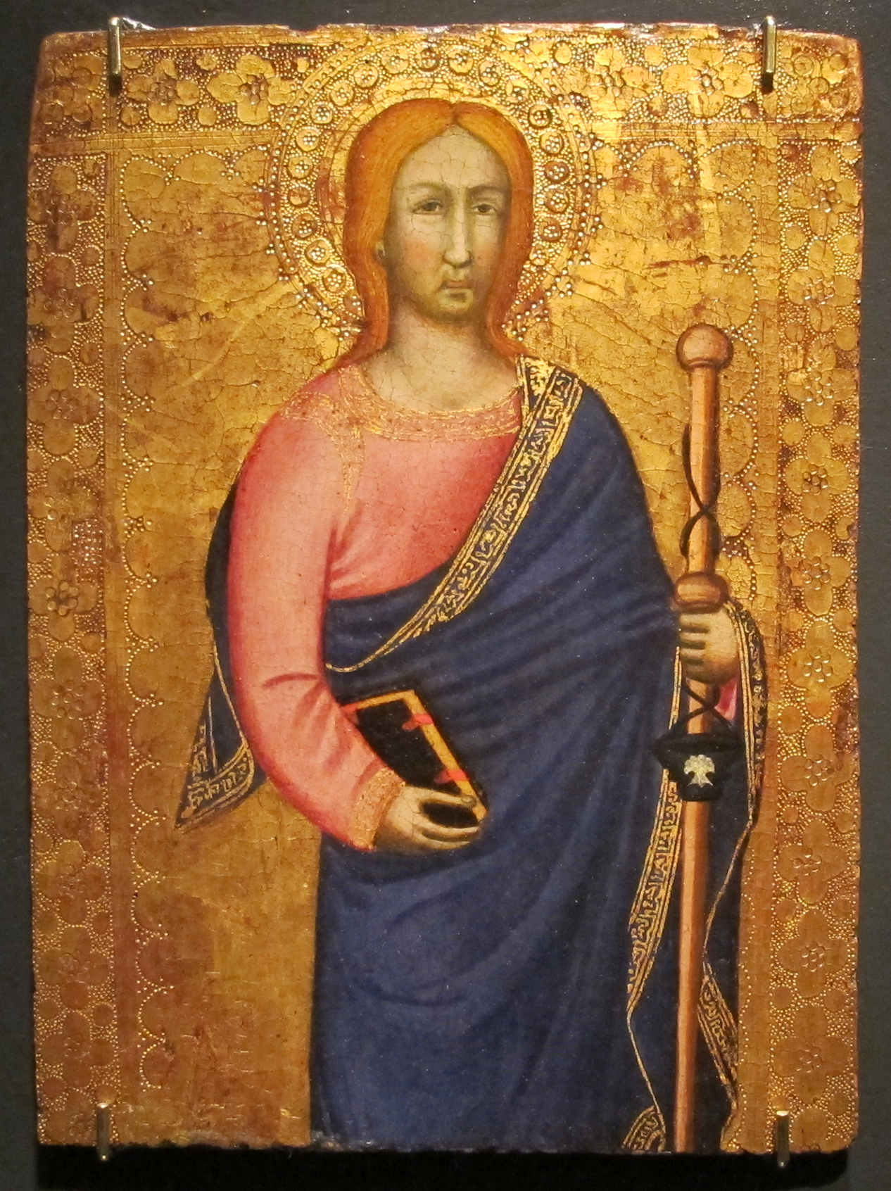 XXVIII Biennale dell'Antiquariato (2013), Courtesy of Alberto e Alessandra di Castro